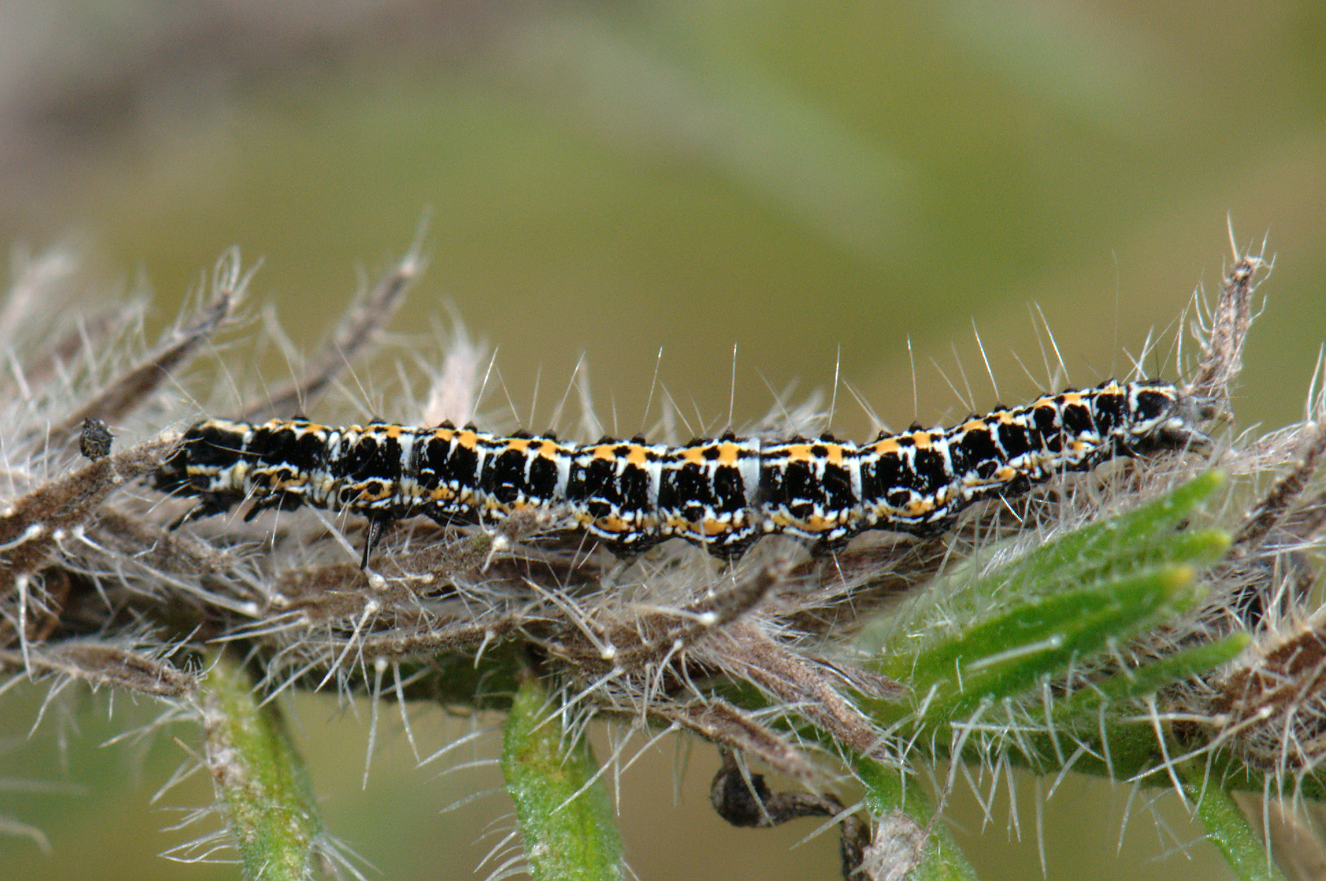 Ethmia bipunctella (Ethmiidae), Raupe auf Echium vulgare. Stolper Heide bei Hennigsdorf, Kreis Oberhavel, Brandenburg